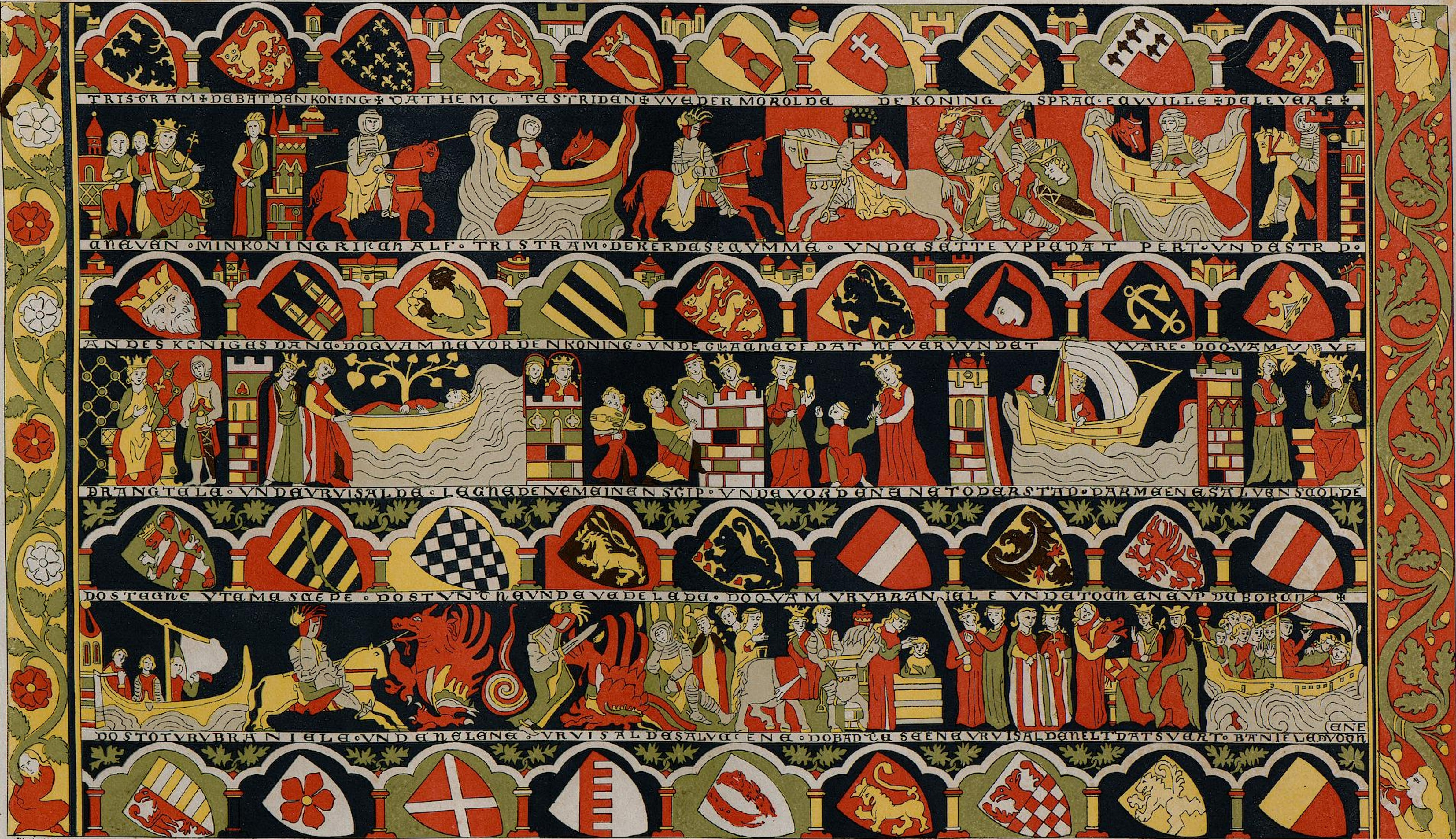 Das Kloster Wienhausen bei Celle. In: Archiv für Niedersachsens Kunstgeschichte : eine Darstellung mittelalterlicher Kunstwerke in Niedersachsen und nächster Umgebung. Hannover: Hellwing, 1849-62. Tristanteppich